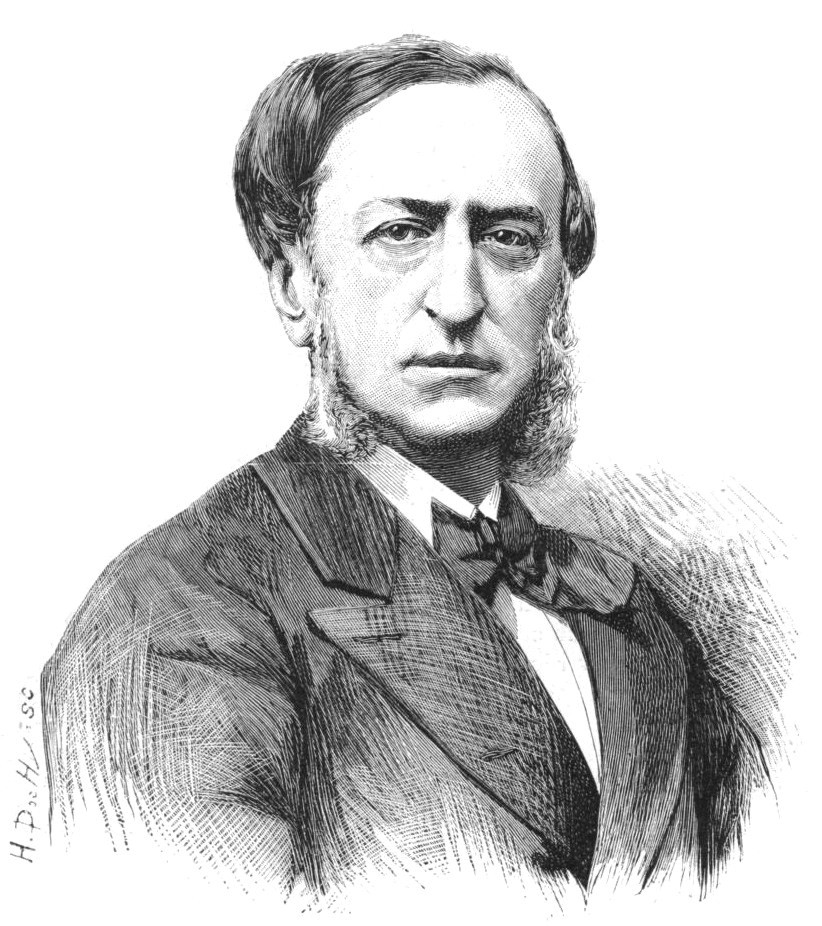 M. Depeyre